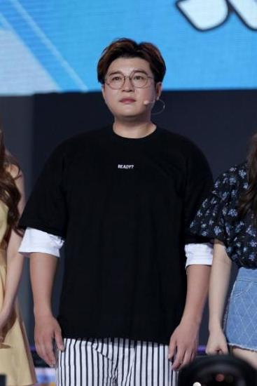 2017 신동